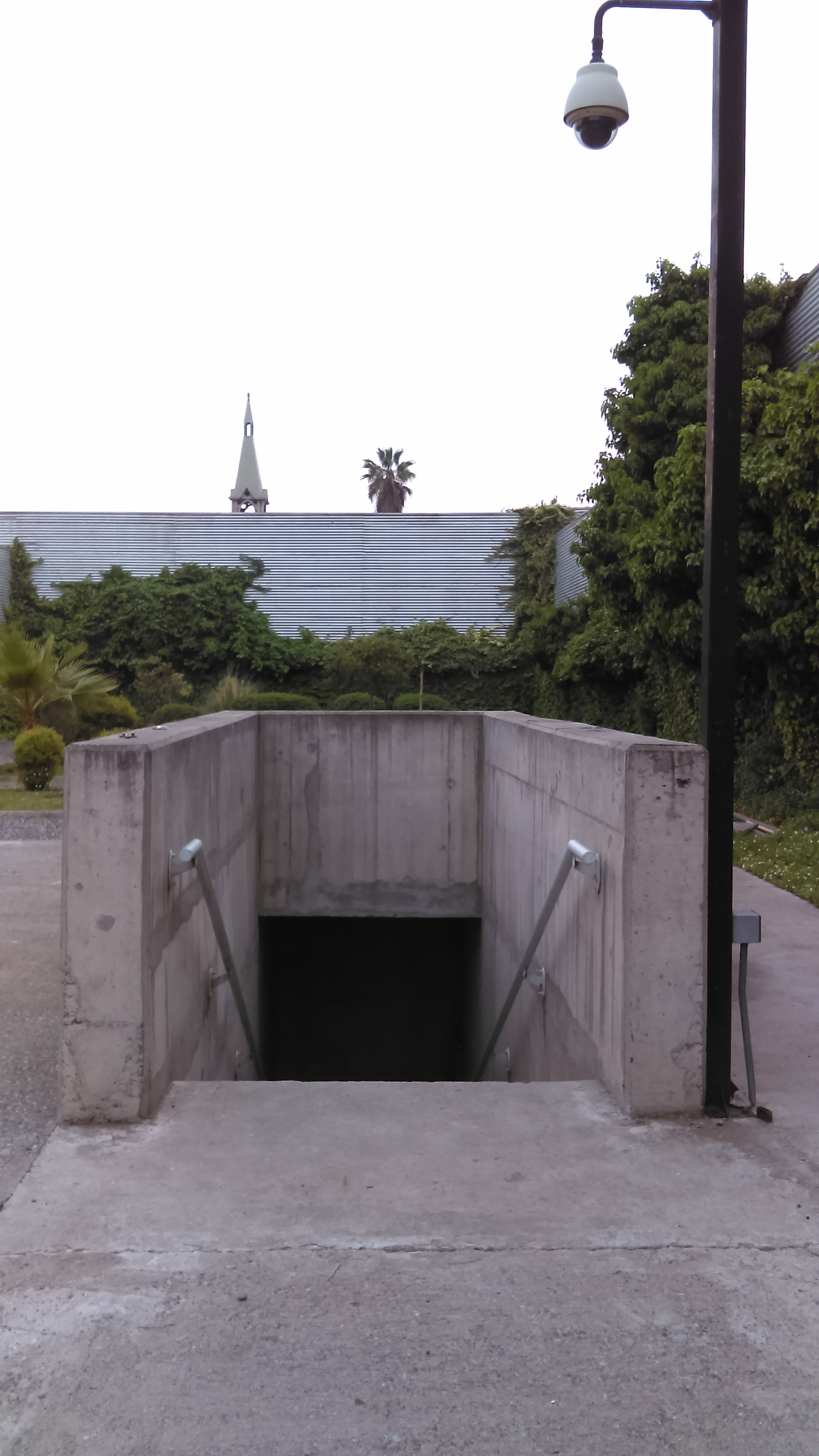 Boca de la estación de metro Libertad, actualmente no operativa.